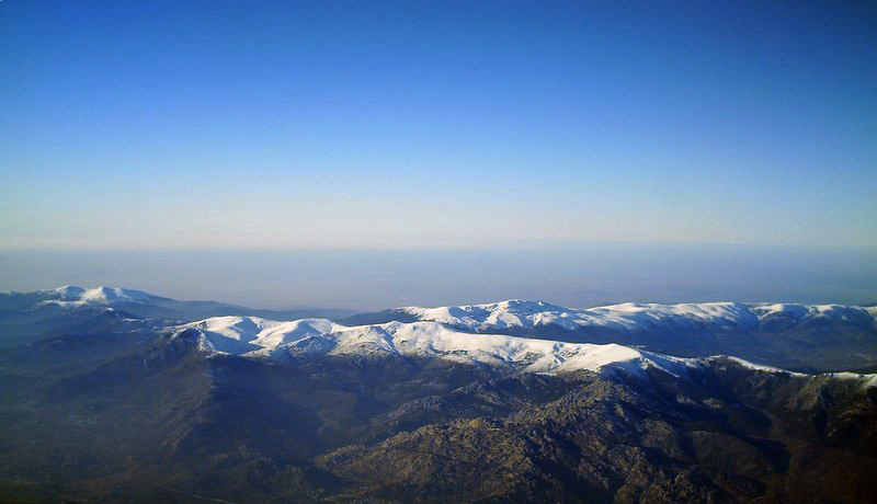 Montañas nevadas, posiblemente en la sierra de Madrid o Guadarrama o quizás los Montes de Toledo